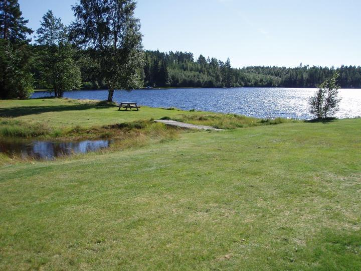 Badeplassen på Halsnes friluftsområde.